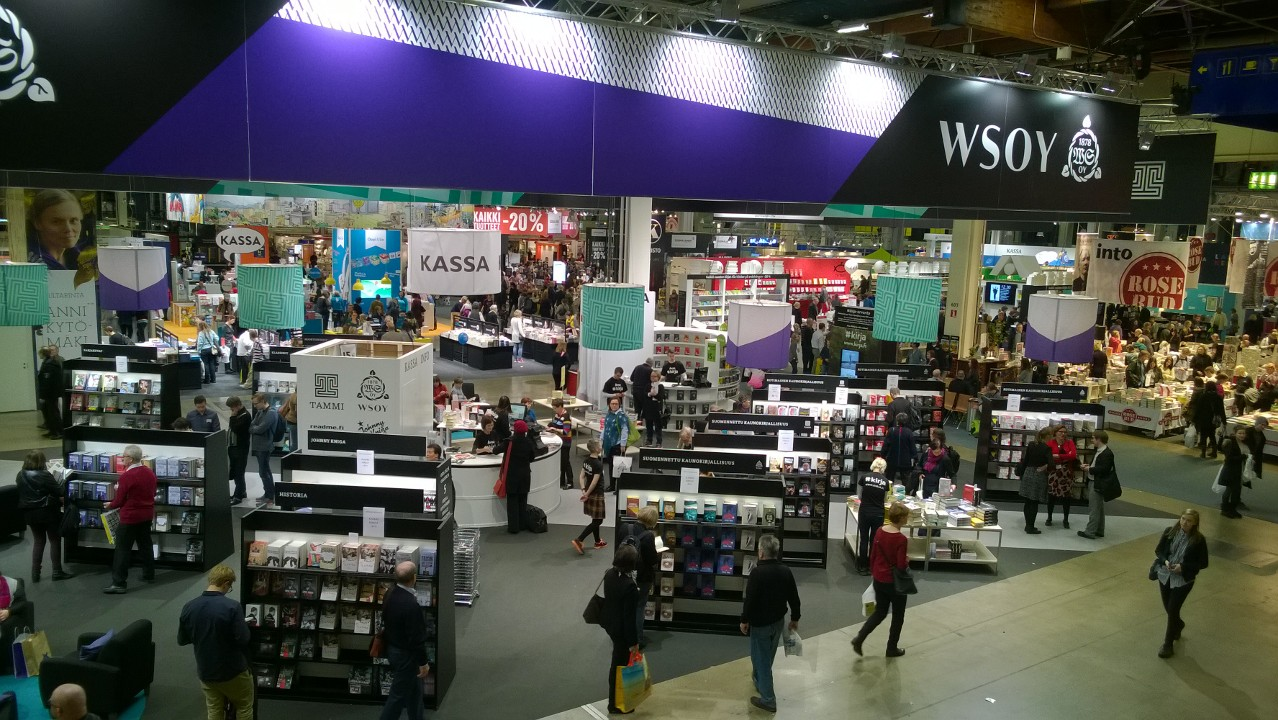 Yleisnäkymä Helsingin kirjamessuilta vuodelta 2014